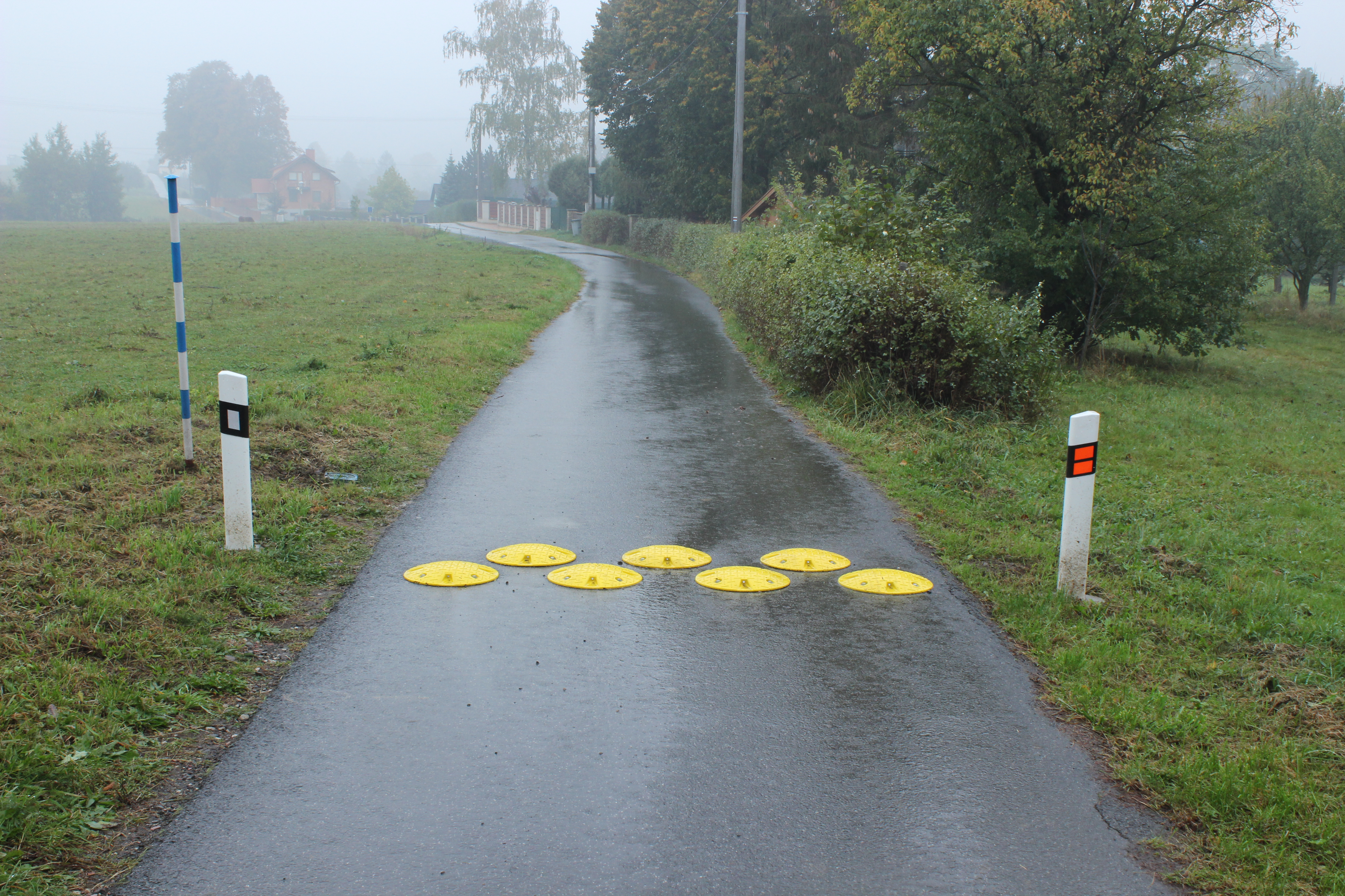 Retardér na místní komunikaci v Hodslavicích u tamního evangelického kostela (pohled k severovýchodu).